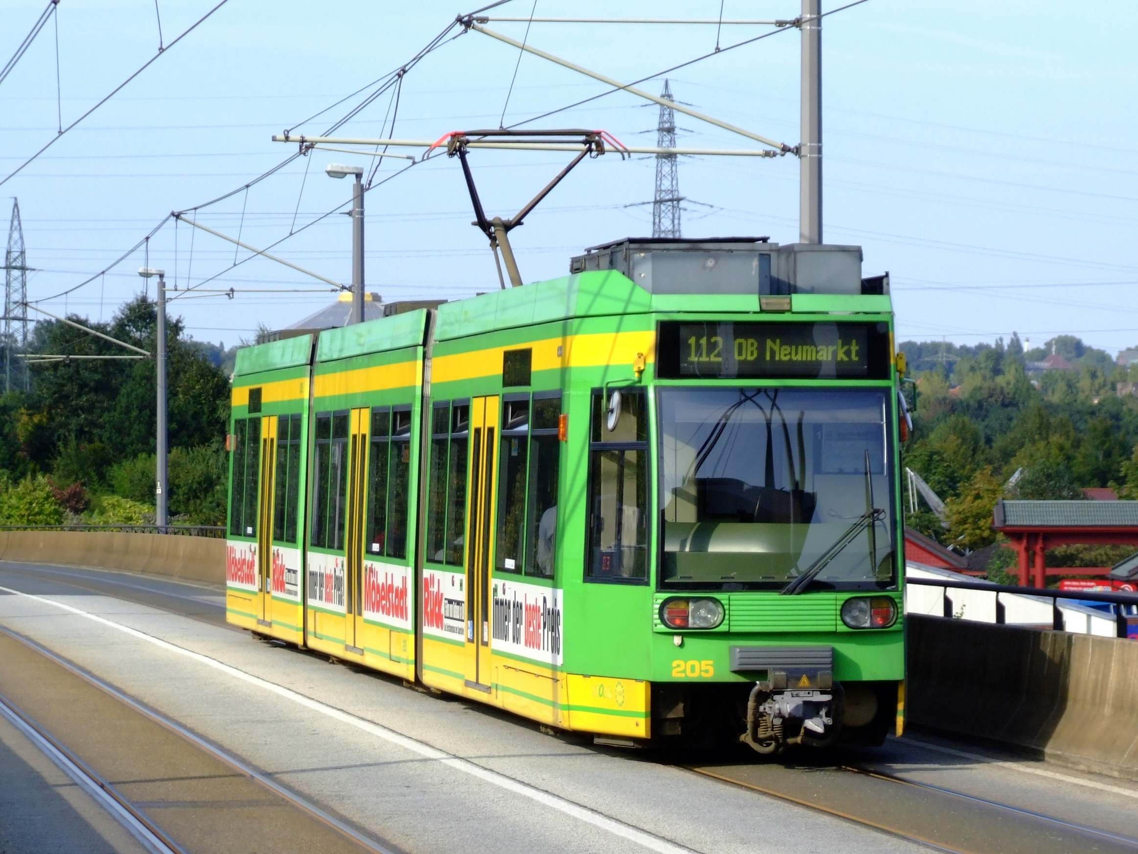 Tram line 12 car 205 Oberhausen towards OB Neumarkt.